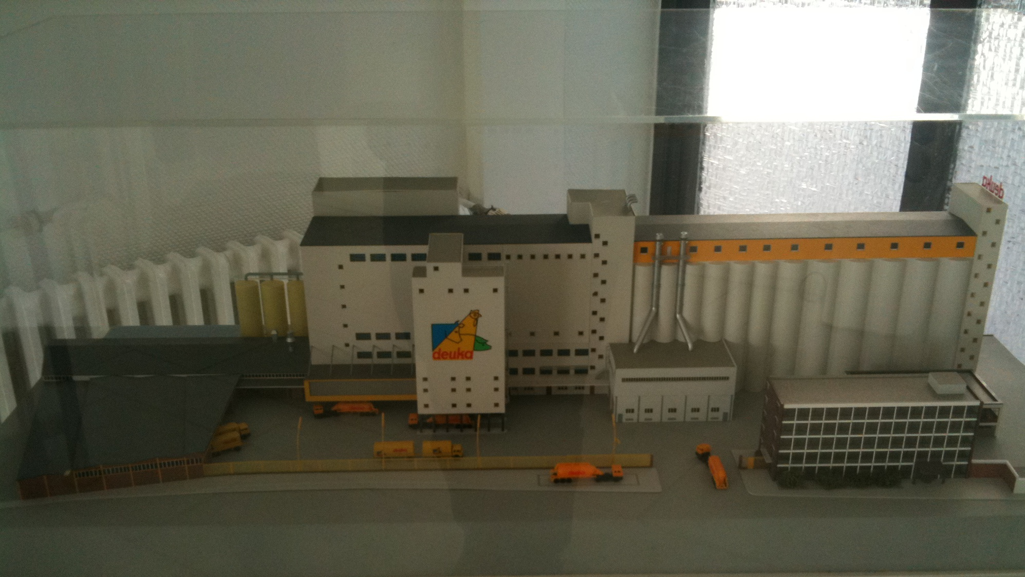 Modellbau der Deutschen Tiernahrung Cremer, Düsseldorf (Markenname Deuka)